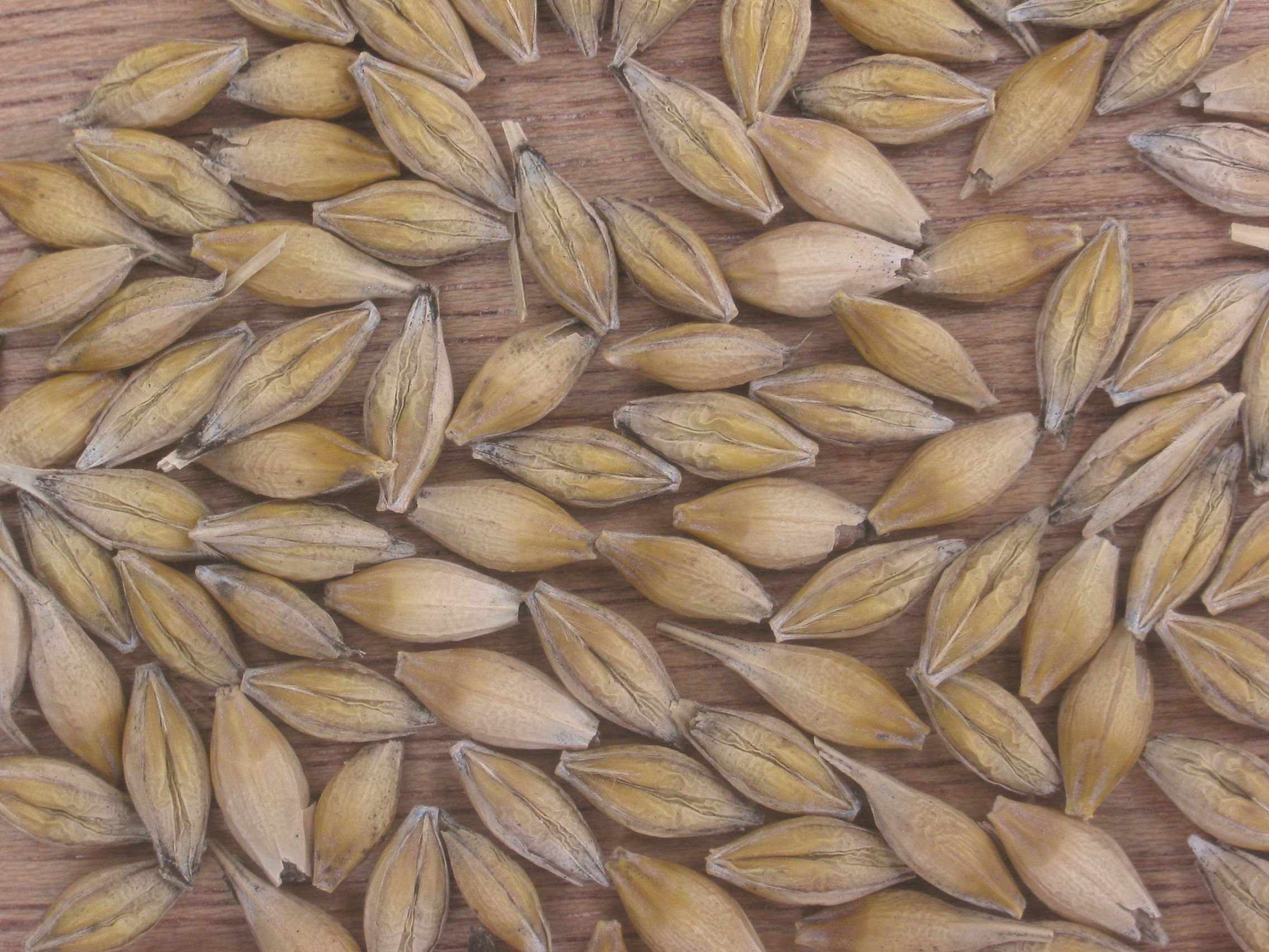 (gerstenkorrels) Hordeum vulgare